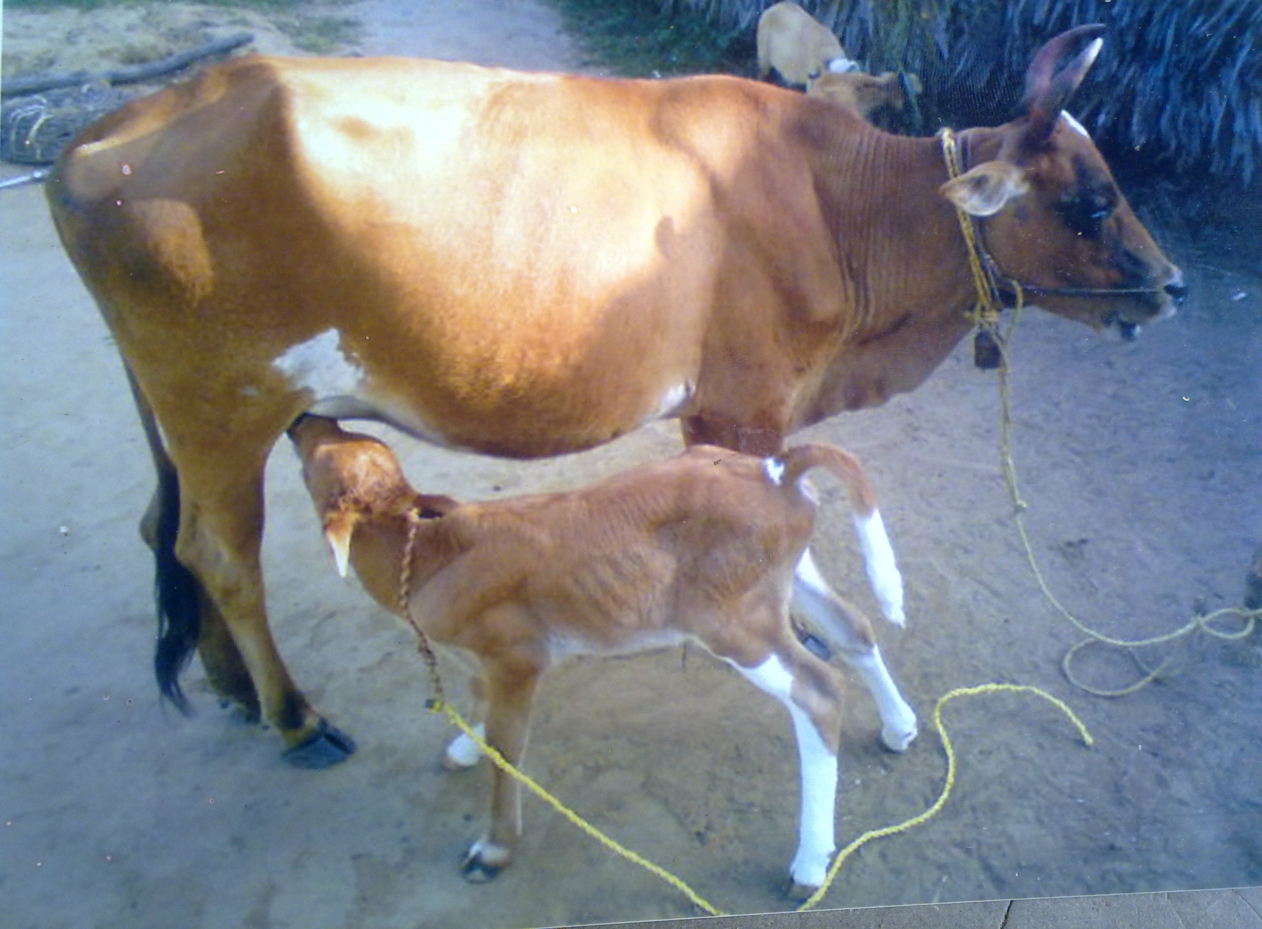 கன்று தன் தாயிடம் பால் அருந்துகிறது.